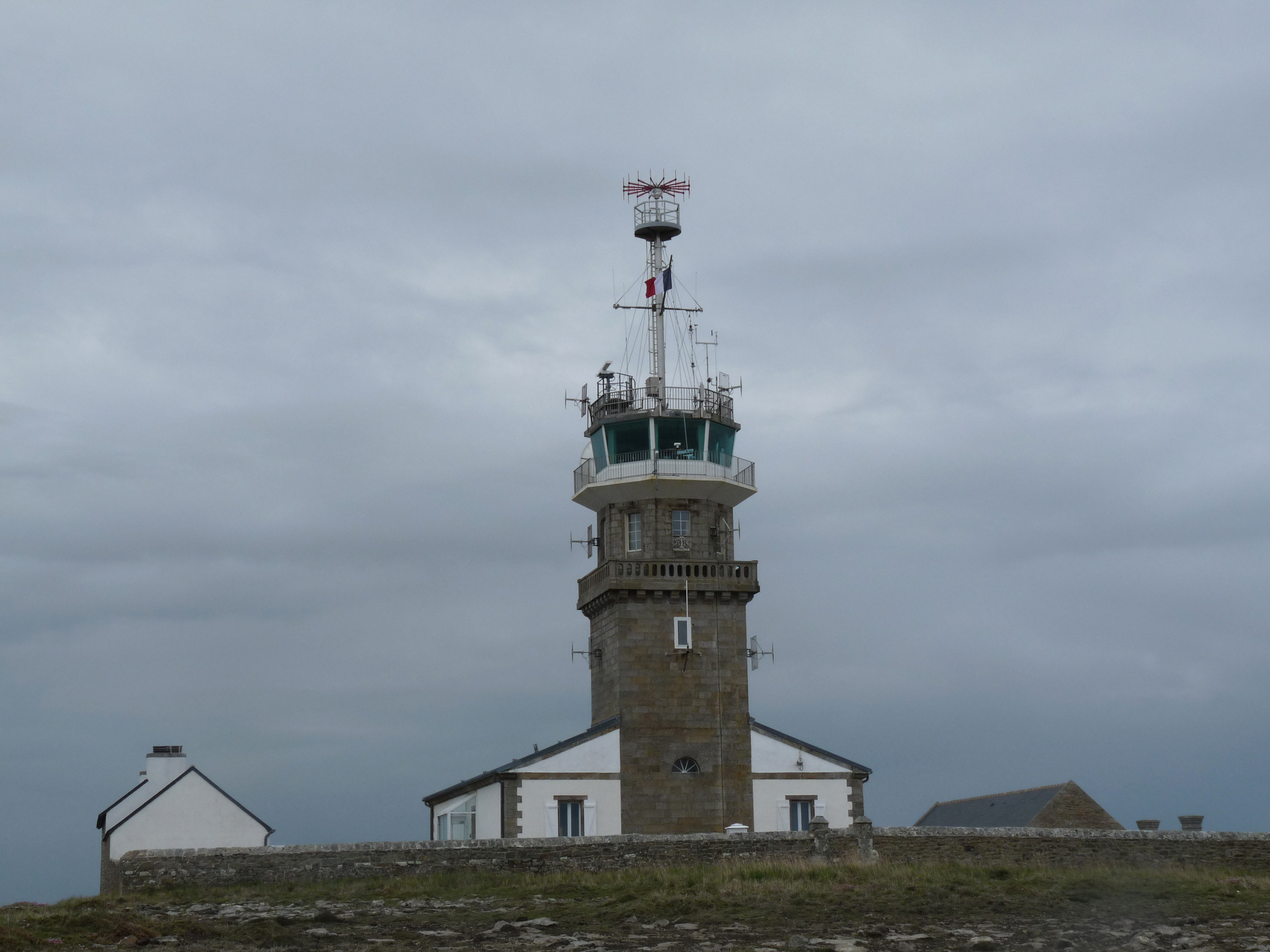 Sémaphore de la Pointe du Raz (Finistère)